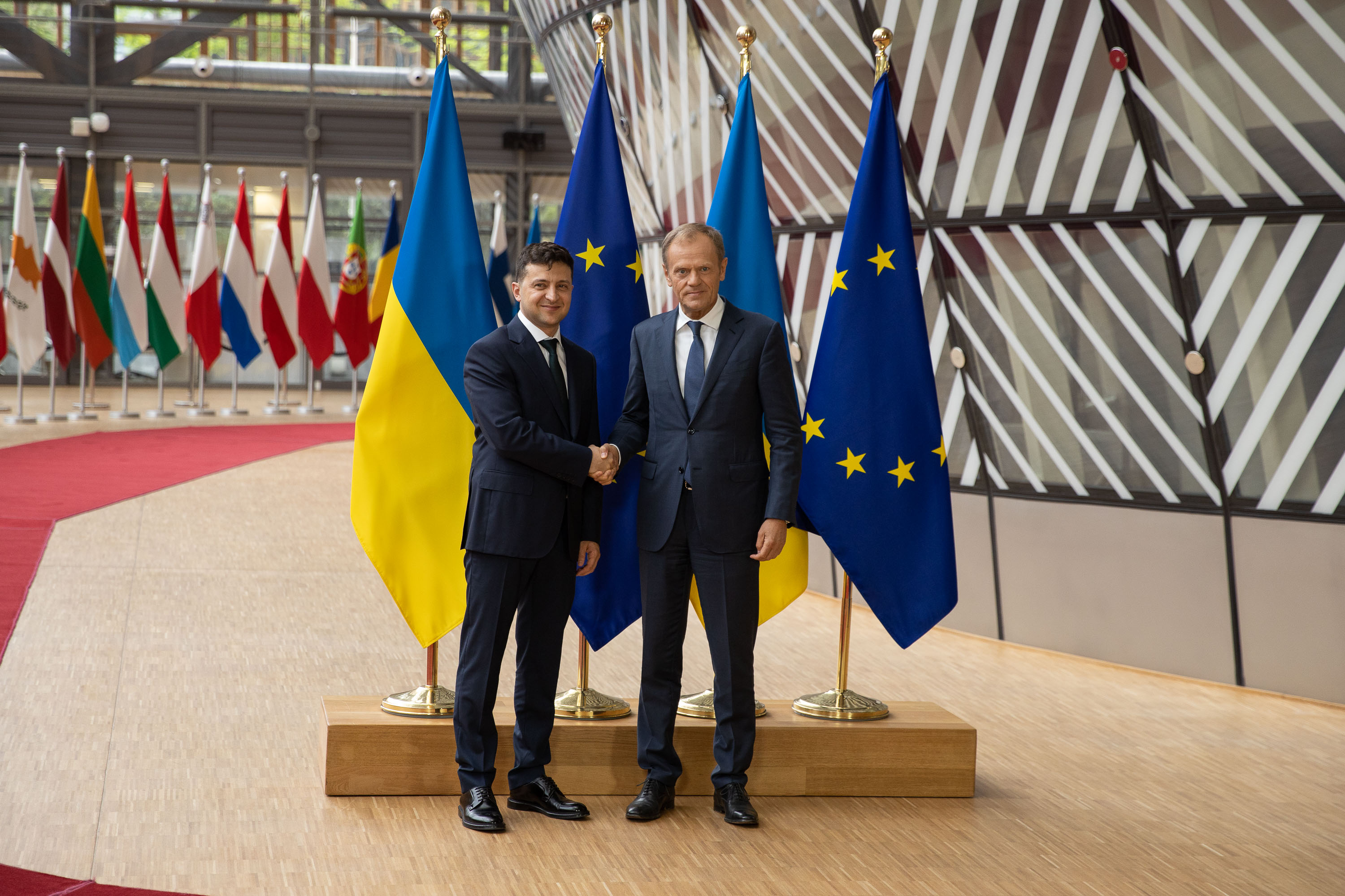 Визит Президента Украины в институты ЕС и НАТО в Брюсселе